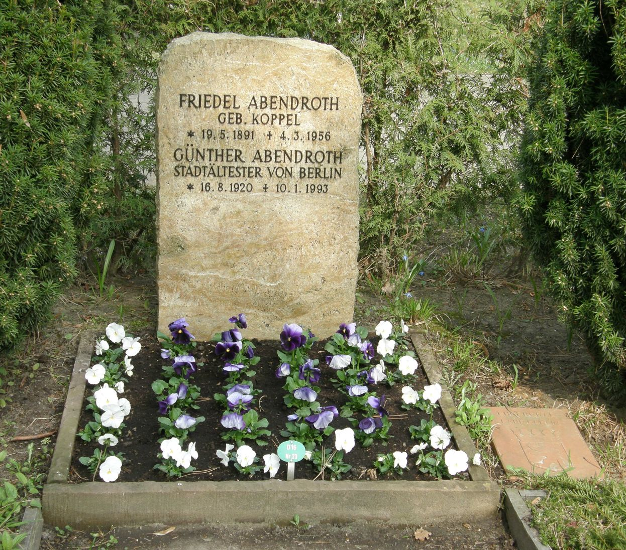 Friedhof Wilmersdorf in Berlin; Grab von Günther Abendroth (Ehrengrab des Landes Berlin)